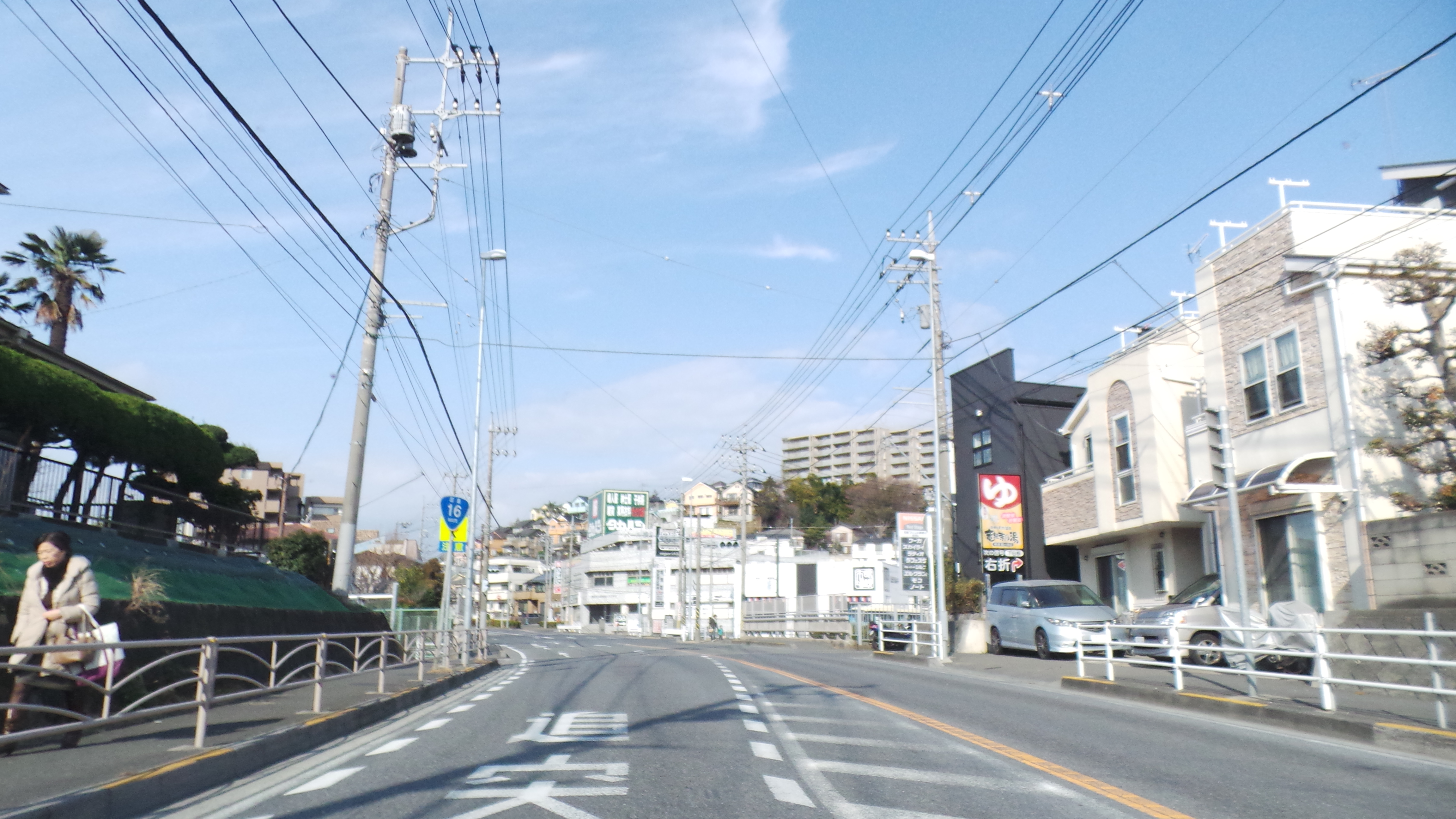 Kawashimacho, Asahi Ward, Yokohama, Kanagawa Prefecture 241-0011, Japan